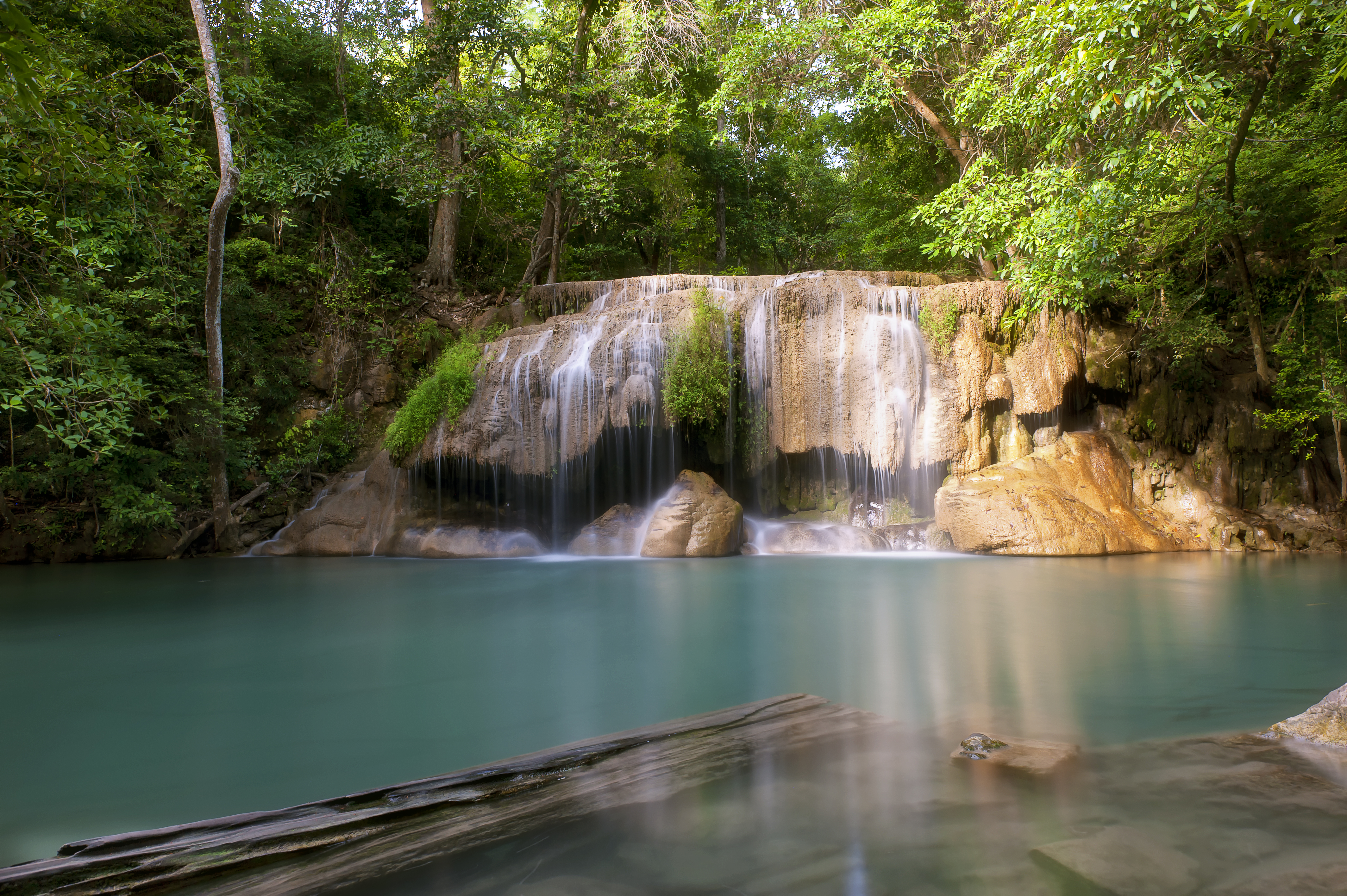 น้ำตกเอราวัณ ชั้นที่ 2 อุทยานแห่งชาติเอราวัณ จังหวัดกาญจนบุรี